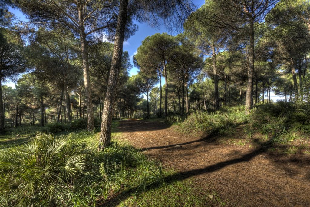 Imagen del sendero que transcurre por el Parque Periurbano La Sierrezuela (Posadas, Córdoba)